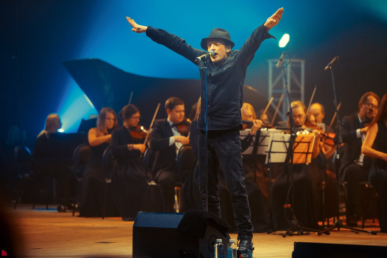 Выступление The Matrixx в Екатеринбурге, 2017 г.